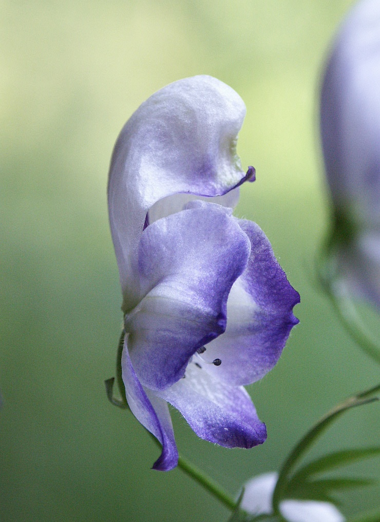 Aconitum variegatum, Schwäbisch-Fränkische Waldberge, Germany